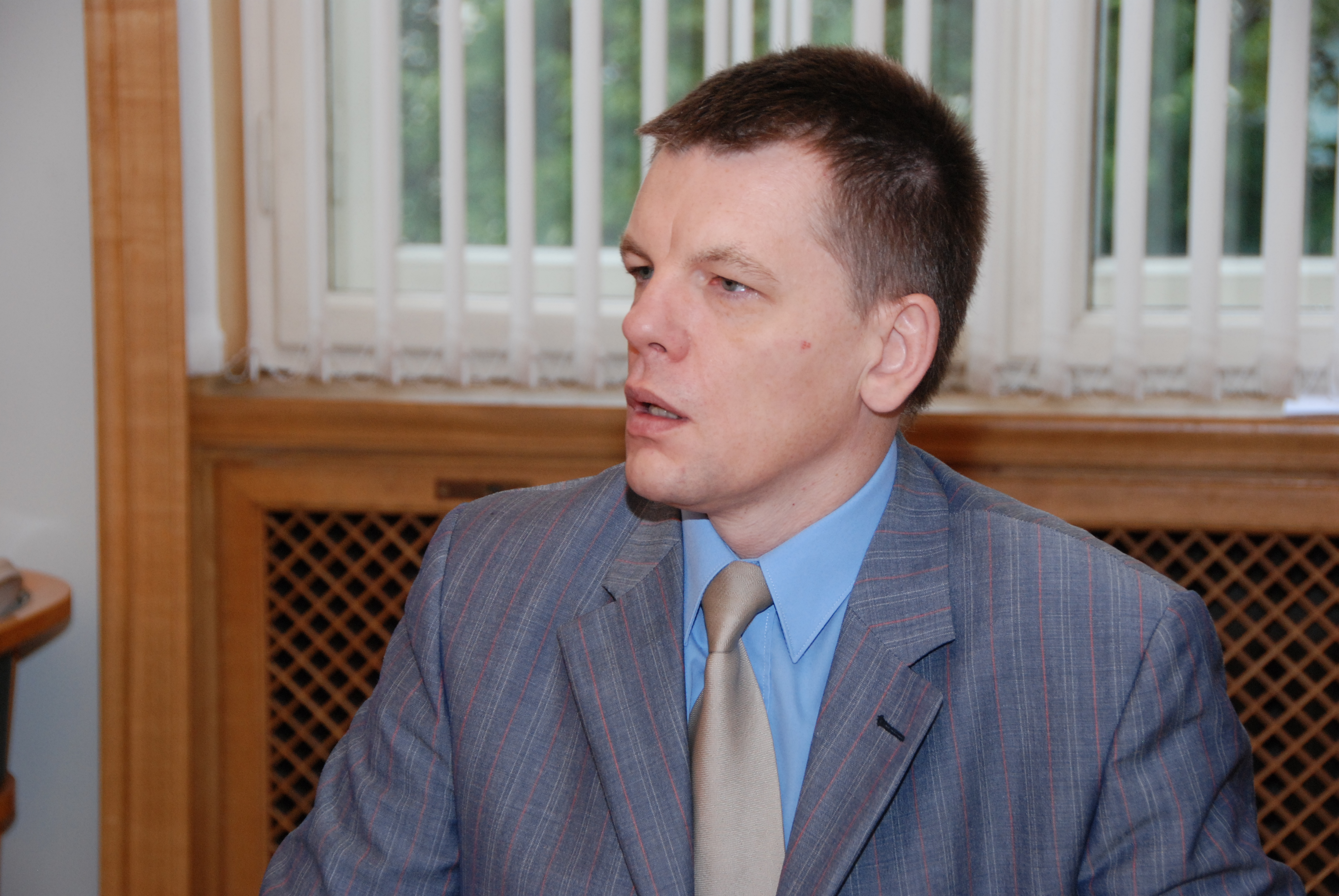 Finanšu ministrs Einars Repše Foto: Aivis Freidenfelds, Valsts kanceleja